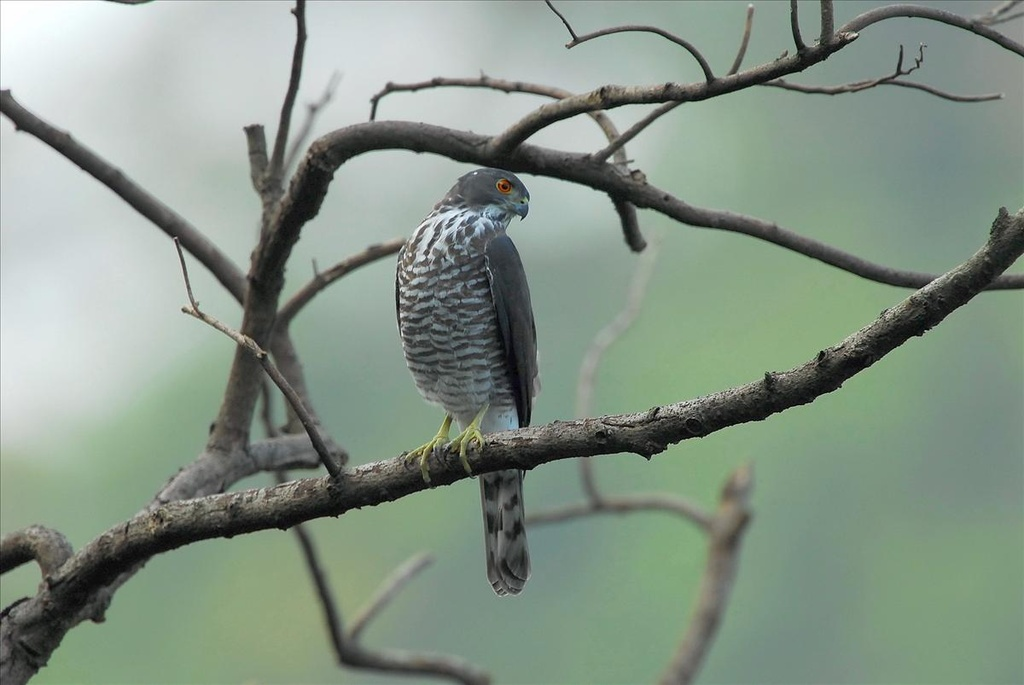 Besra Accipiter virgatus